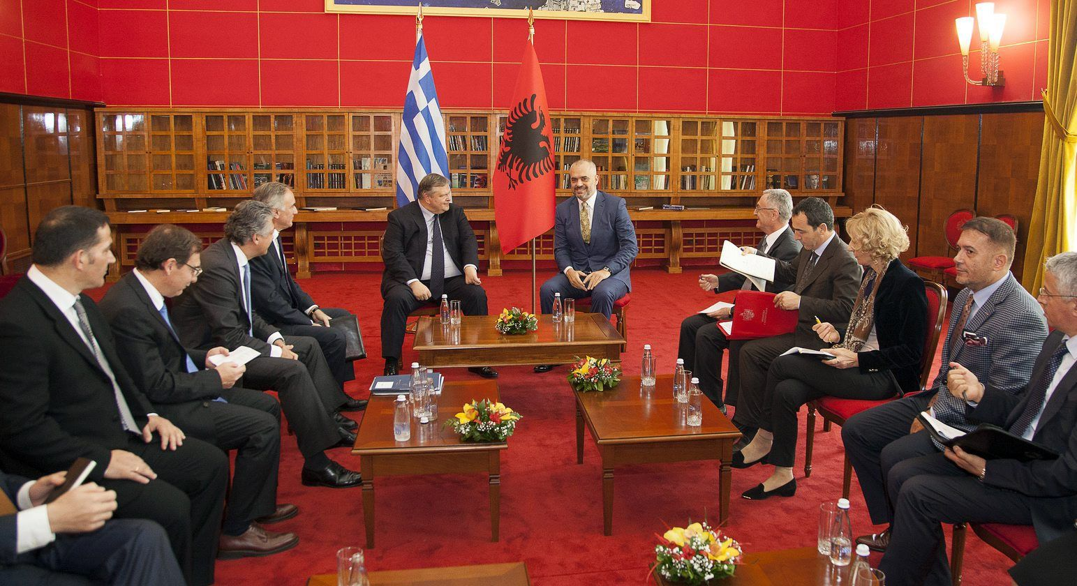 Τη Δευτέρα 14 Οκτωβρίου 2013, ο Αντιπρόεδρος της Κυβέρνησης και Υπουργός Εξωτερικών Ευάγγελος Βενιζέλος, συναντήθηκε με τον Πρωθυπουργό της Αλβανίας, κ. Edi Rama